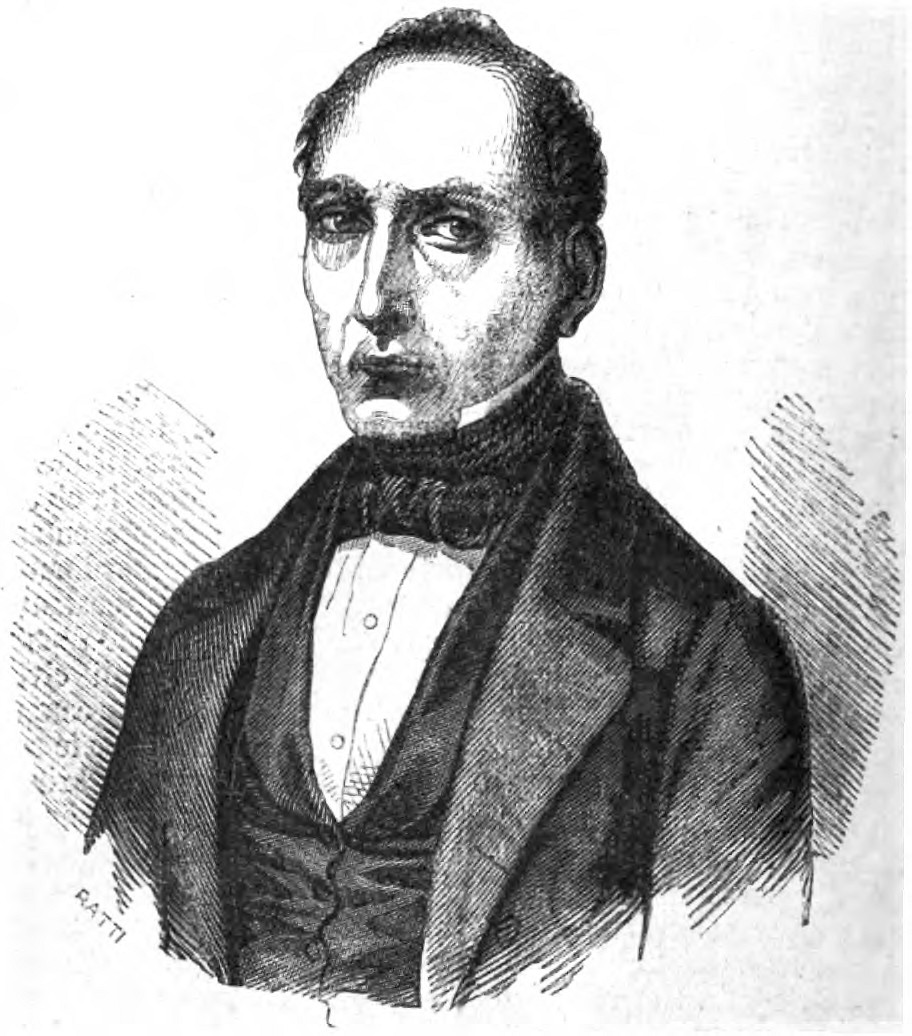 Vitaliano VIII Borromeo